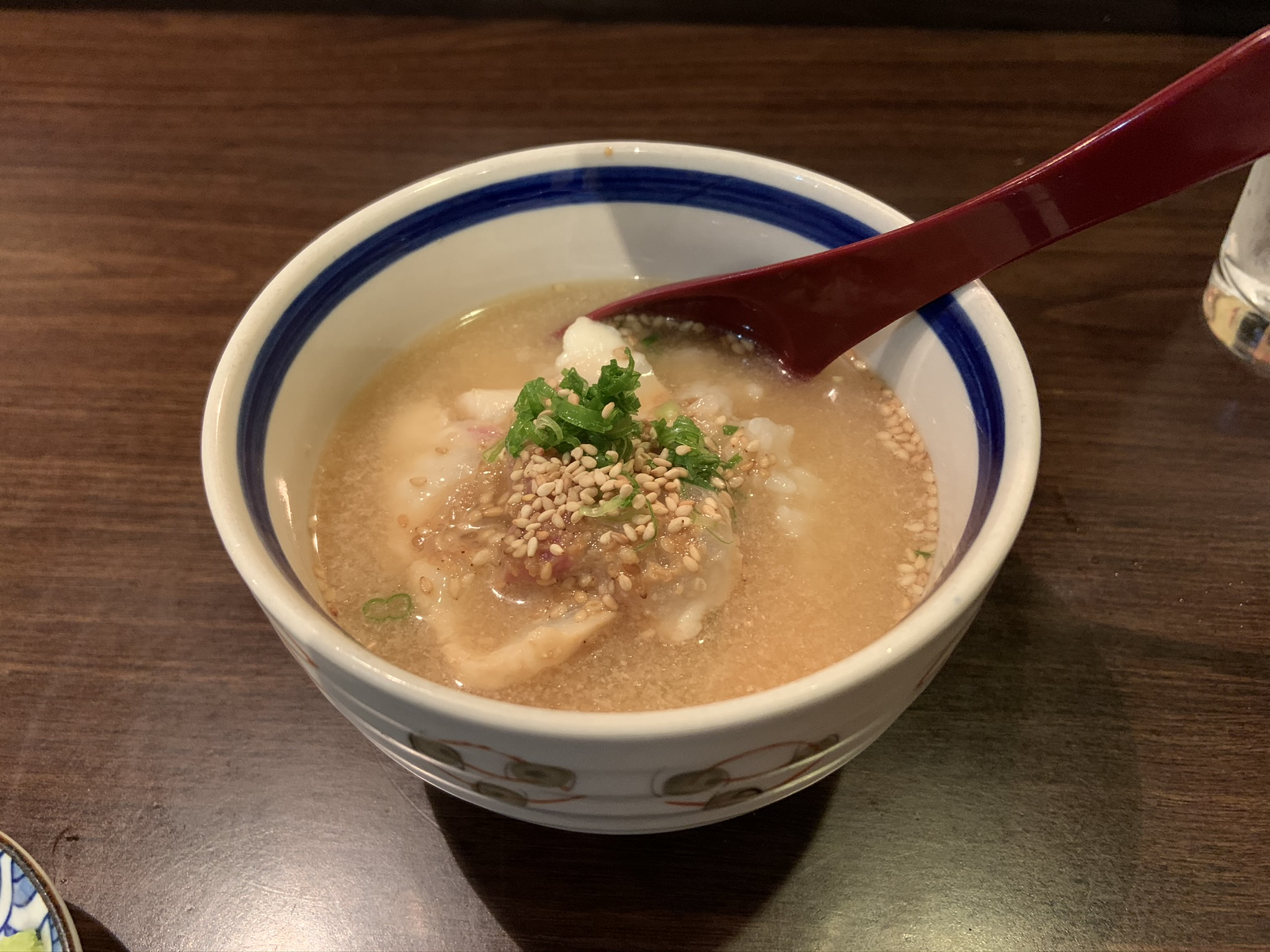 2019年11月5日、鳥取市内の料理屋「たもや」で撮影。